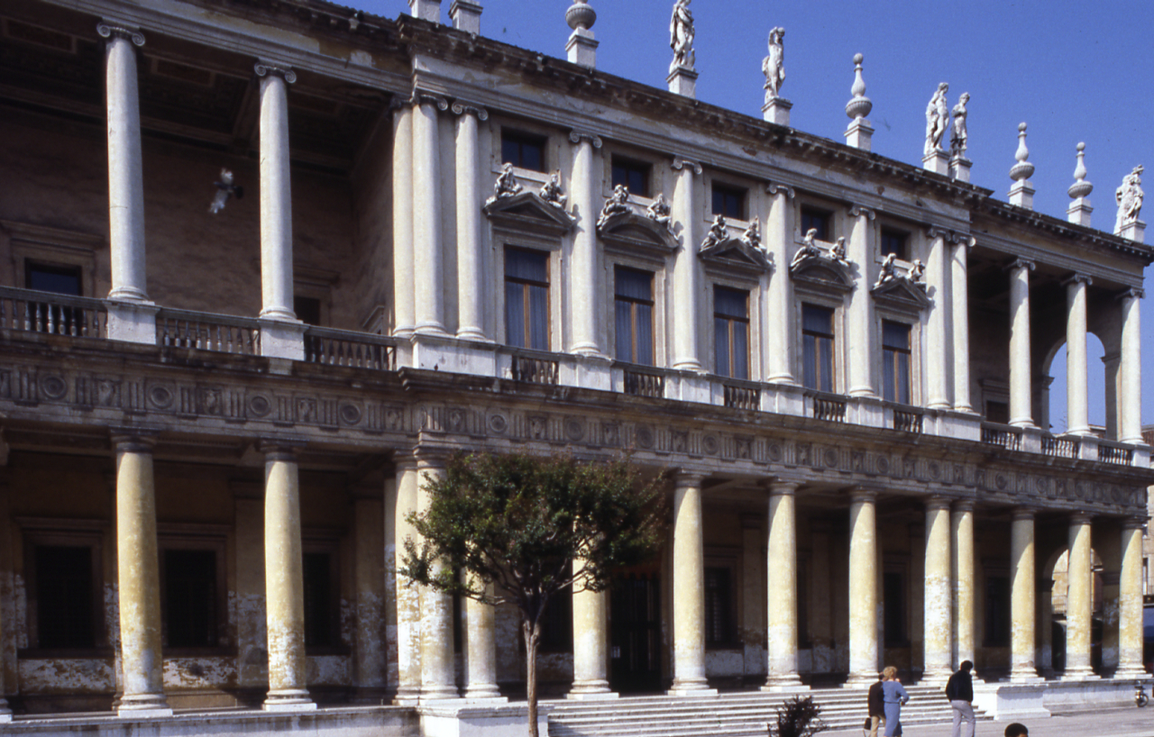 Palazzo Chiericati, Vicenza. Servizio fotografico : Vicenza, 1980 / Paolo Monti. - Foglio: 1, Fotogrammi complessivi: 17/20 : Diapositiva, sviluppo cromogeno/ pellicola ; 35 mm. - ((Sullo chassis della diapositiva n. 03 iscrizione manoscritta a matita: "Vicenza/ Palladio". - Le diapositive nn. 01-03 costituiscono un'altra serie. - (4):. - 04-10 = Palazzo Chiericati;. - 11-12 = Basilica Palladiana;. - 13-15 = Palazzo del Capitanio;. - 16-20 = Teatro Olimpico. - Occasione: Documentazione per: "Calendario Palladiano", Milano, Electa, 1980. - Fonte: Rubrica di Paolo Monti: Diapositive 24x36mm (1948-1982), presso Archivio Paolo Monti. Rubrica con elenco soggetti e numeri di inventario (da 1 a 1000) corrispondenti ai fogli a tasche in pvc in cui sono contenute le diapositive. - Fonte: Fattura di Paolo Monti: IV. Commesse/ Fattura n. 02/ Calendario Palladiano 1980 (1980/01/15), presso Archivio Paolo Monti. N. 2 diapositive colore per marzo e maggio.